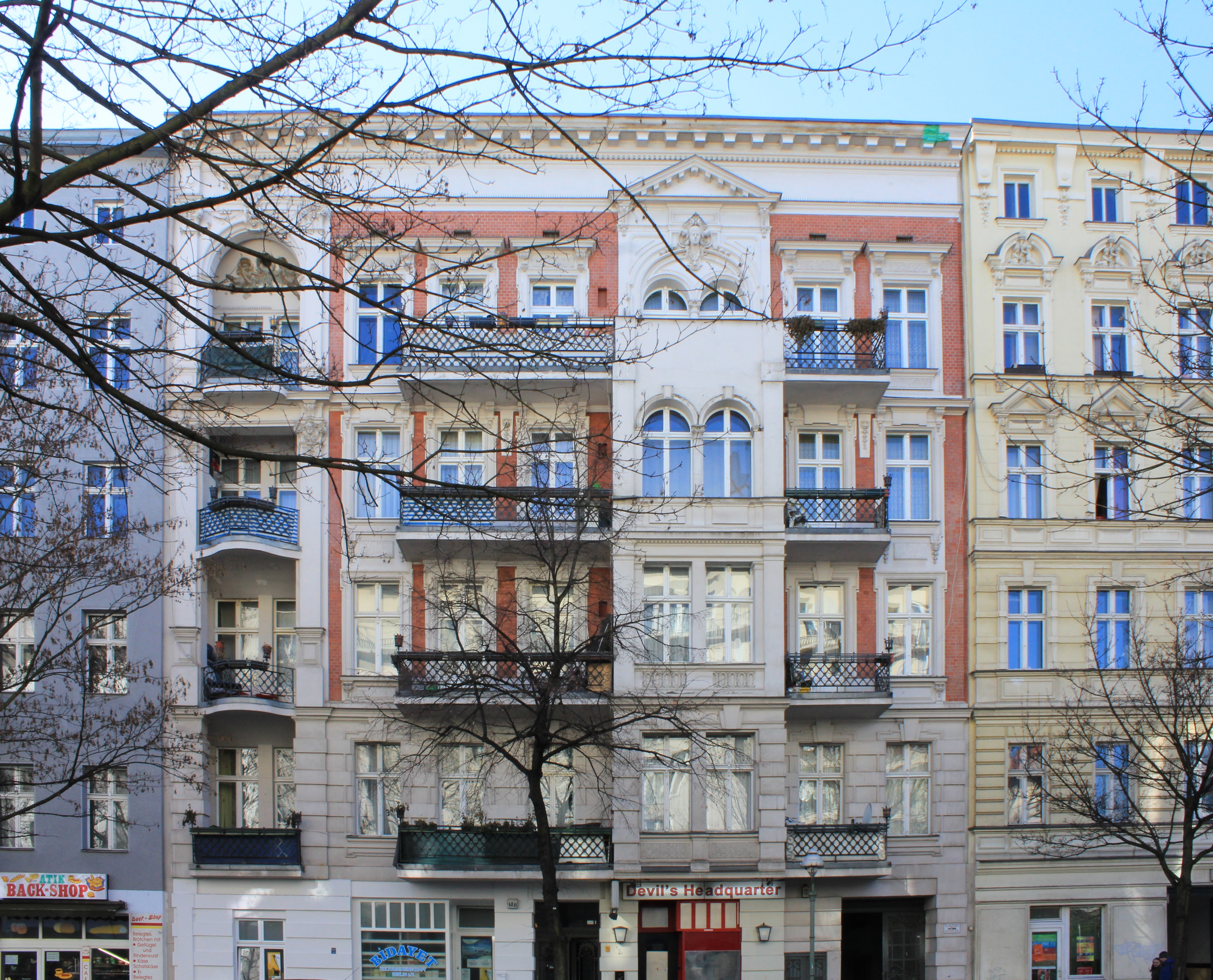 Mietshaus 1894 von August Spahr